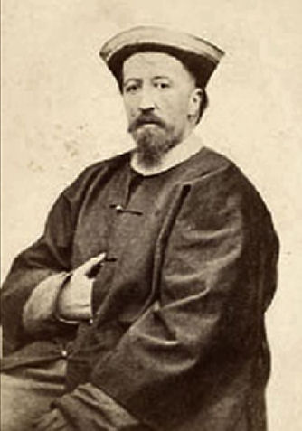 Portrait représentant Théophile Verbist (1823-1868), pro-vicaire apostolique de Mongolie,à Siwanzé (Mongolie) en 1866.